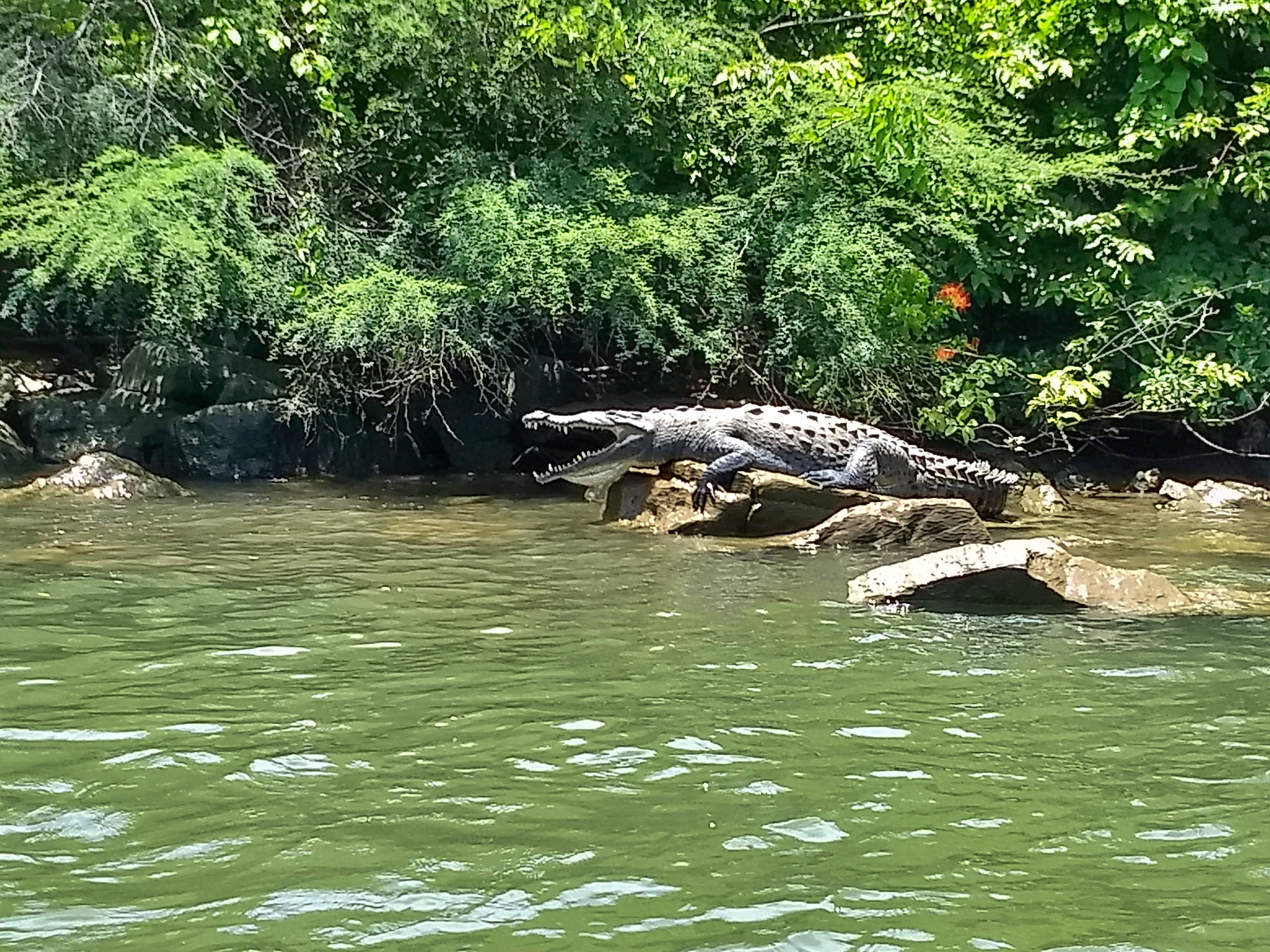 Cocodrilo reposando a la orilla del río Grijalva